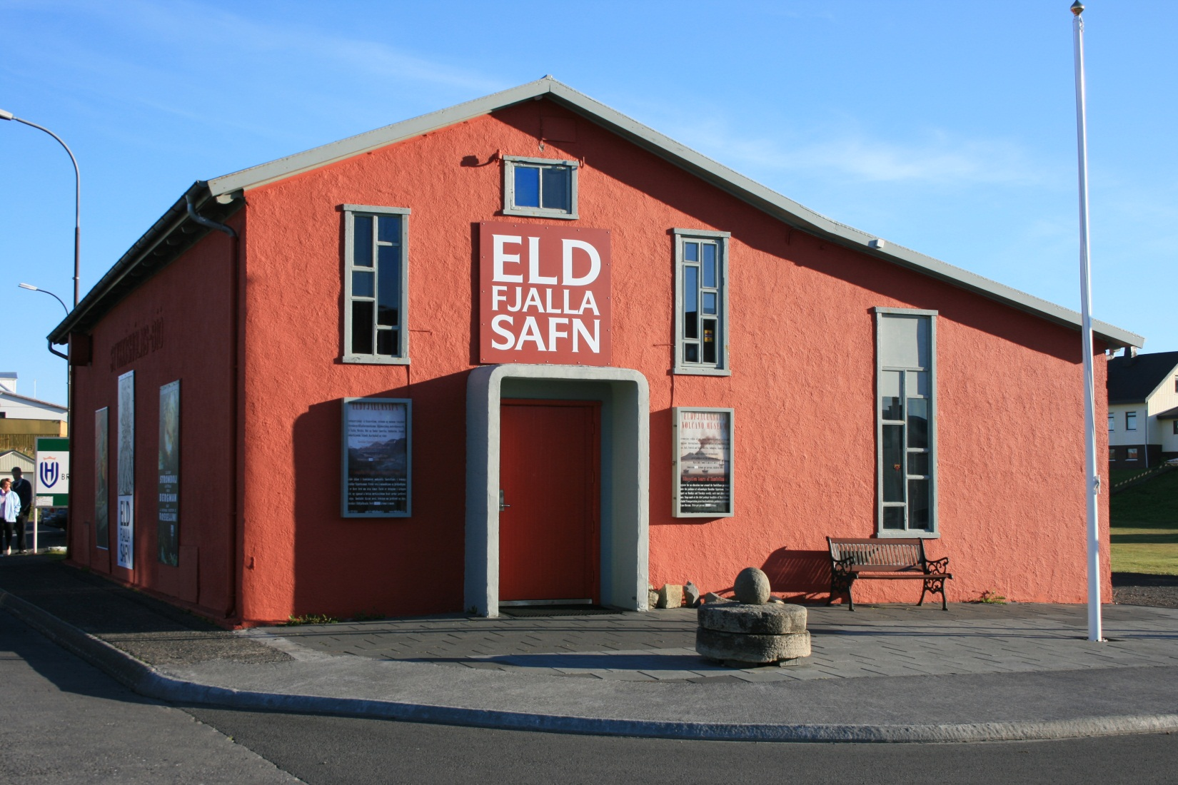 Eldfjallasafnið í Stykkishólmi